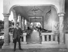 El arquitecto Andrés Kalnay posando junto a una de sus obras maestras en Buenos Aires, la Cervecería Munich en la Costanera Sur de Puerto Madero, en 1929.